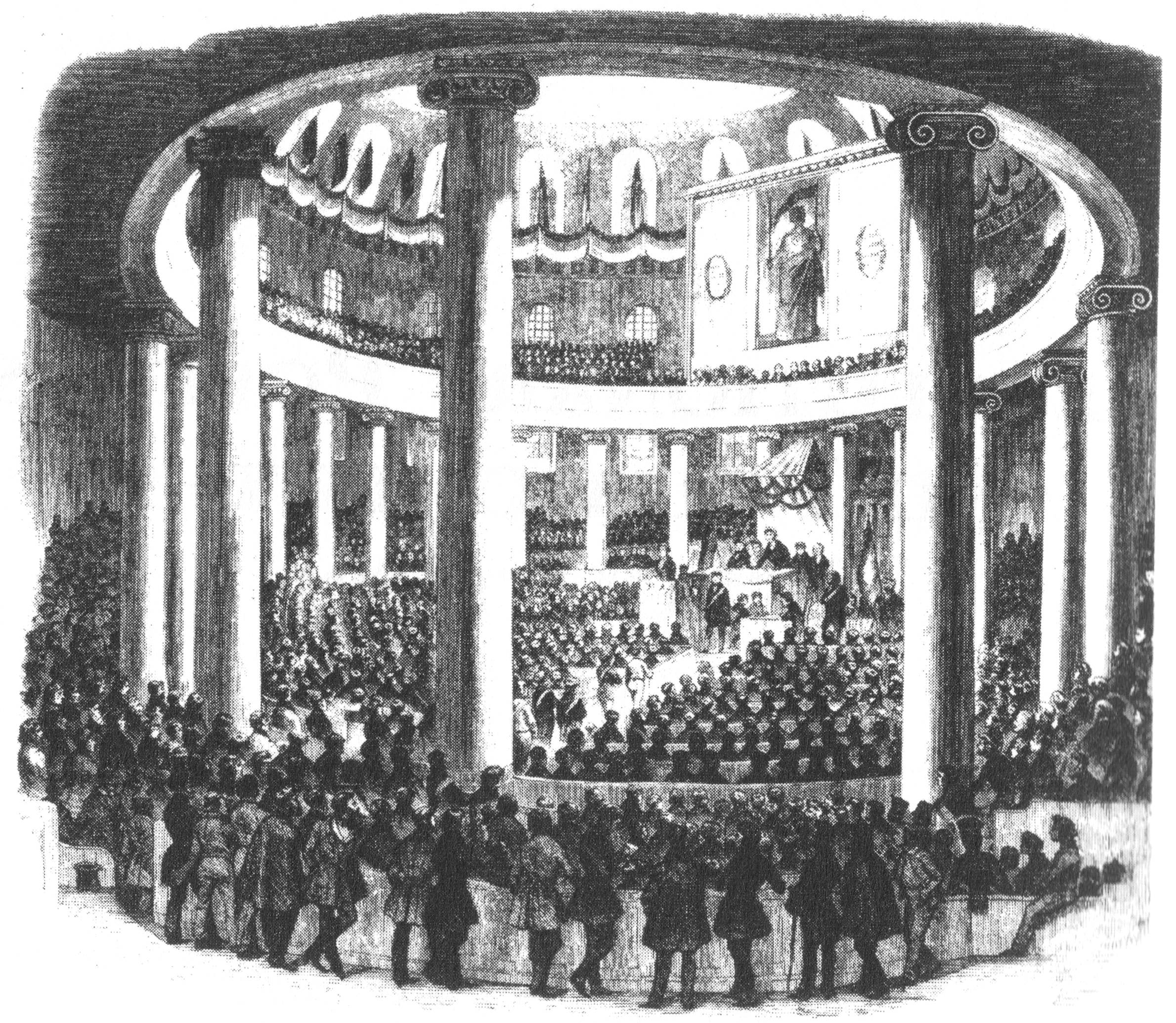 Illustrirte Zeitung, Leipzig, Nr. 225, 20. Mai 1848, 330. Sitzung des Vorparlaments in der Paulskirche zu Frankfurt.